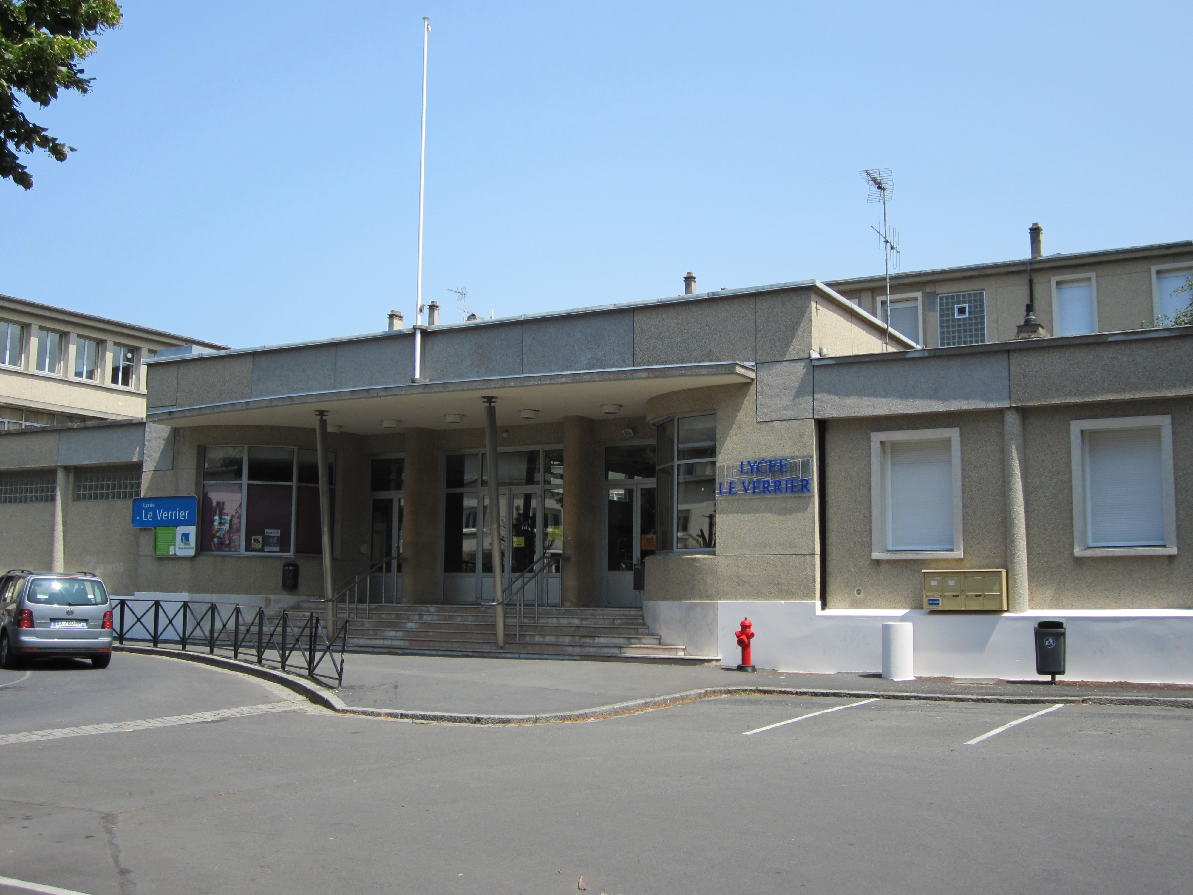 Saint-Lô